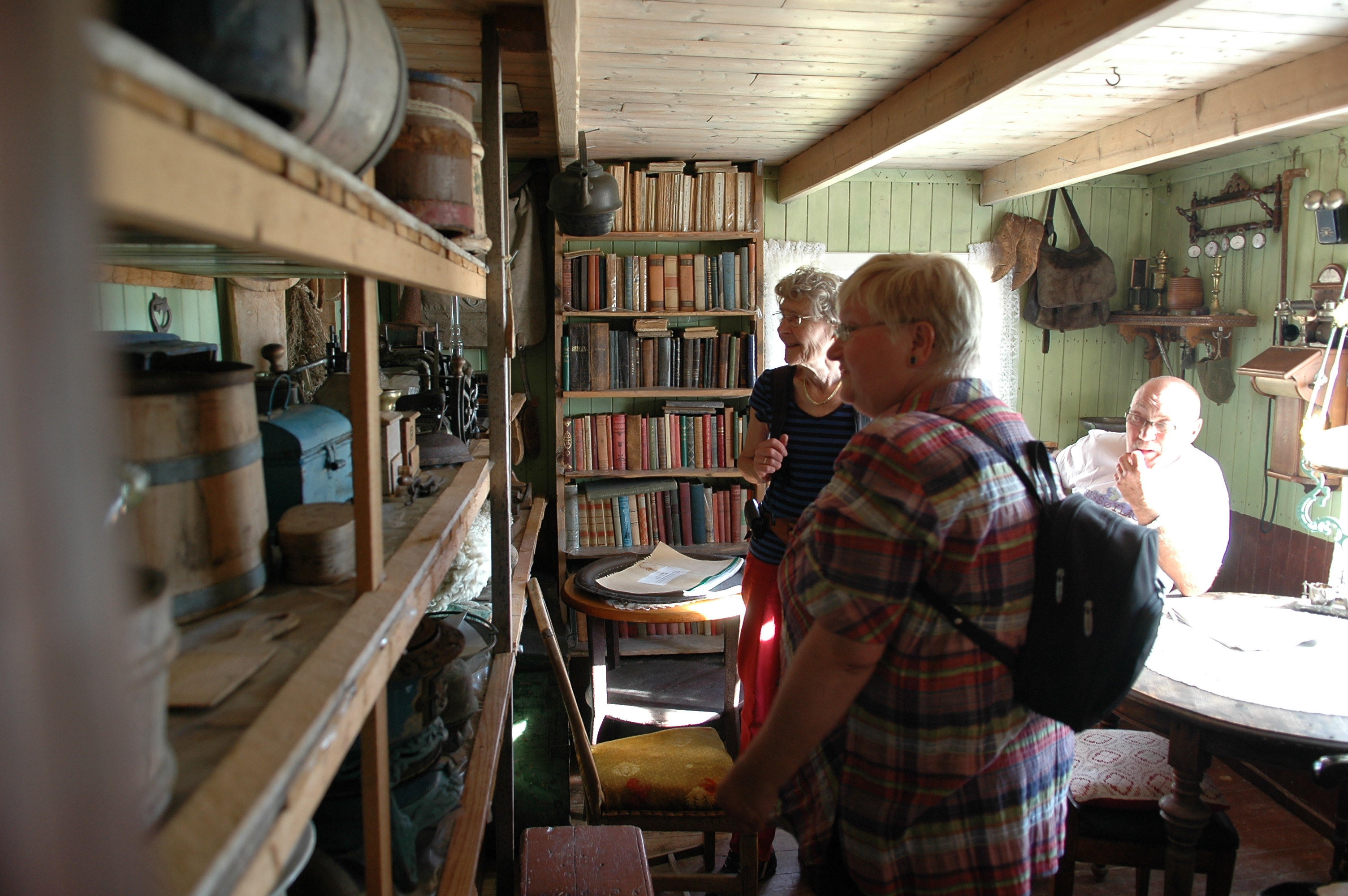 Besøk i samlingen august 2011